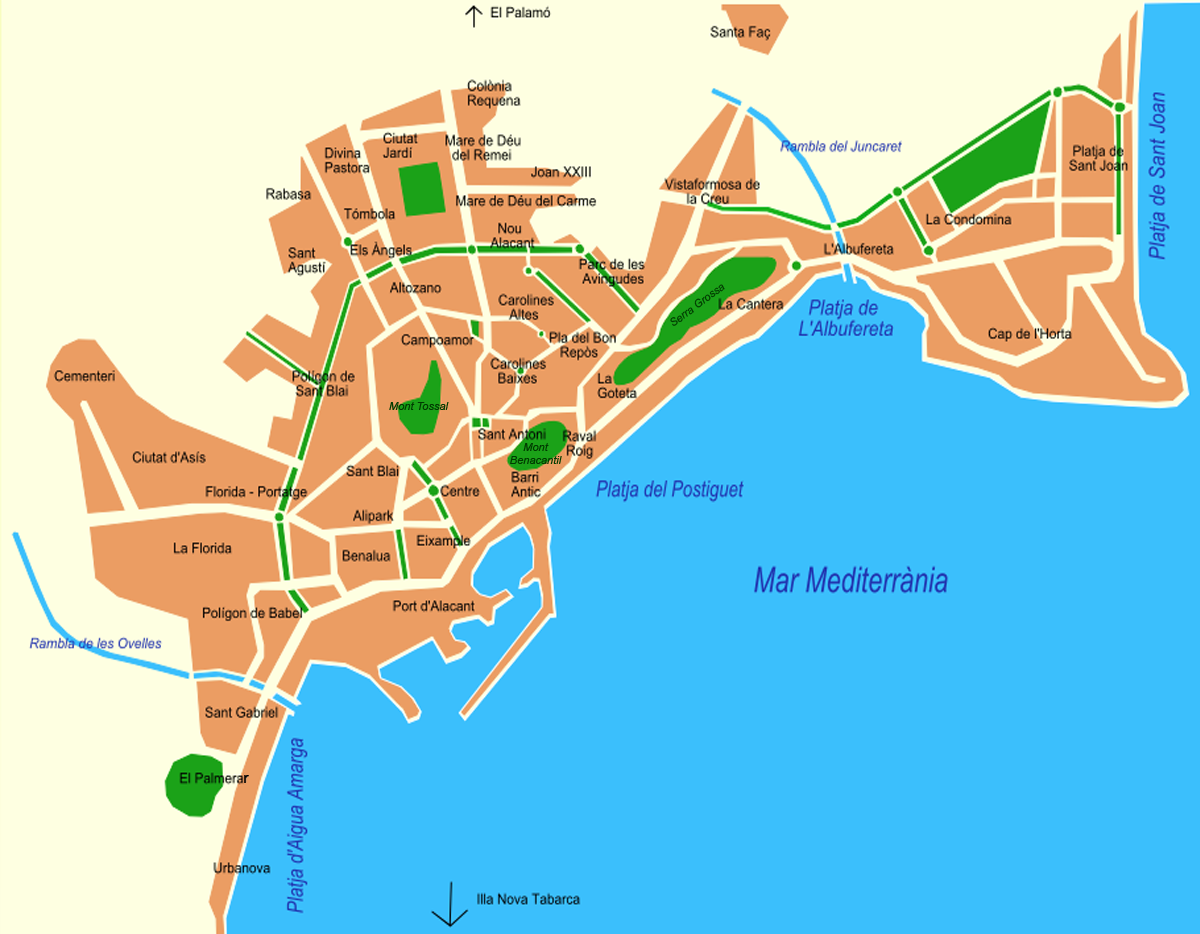 Barris d'Alacant en català/valencià.